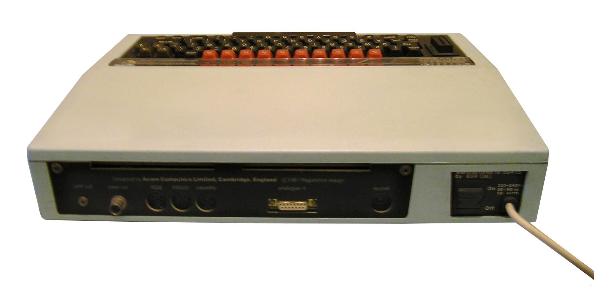 Parte trasera del BBC Micro. Puertos de izquierda a derecha: Salida UHF, Salida de Video, RGB, RS423, Casete, Entrada análoga y Econet. Rear of BBC Micro. Photographed by me. Released for public domain. Ports from left to right: UHF Out, Video Out, RGB, RS423, Cassette, Analogue In and Econet.